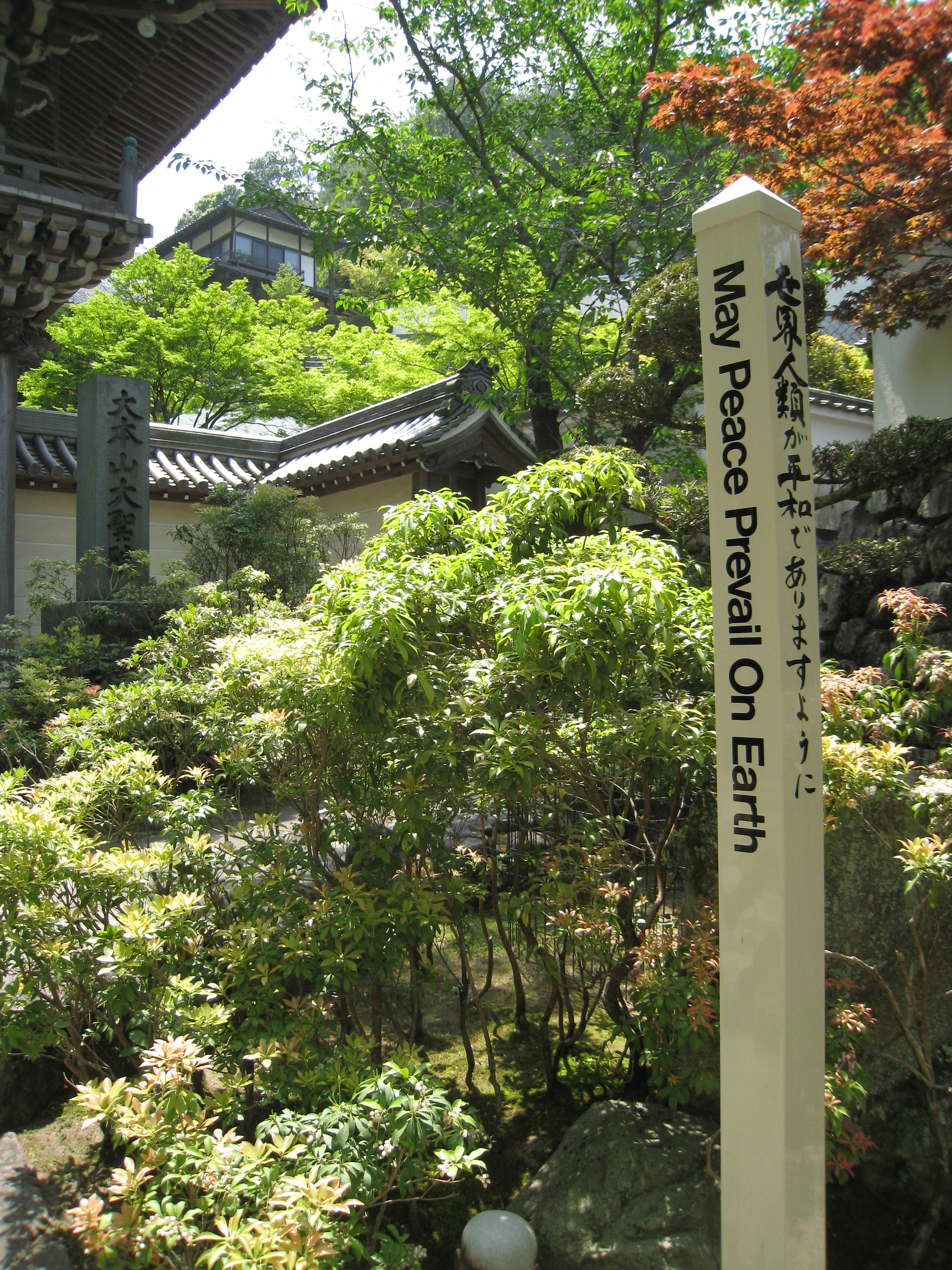 Peace I guess